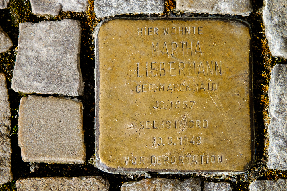 Stolperstein Martha Liebermann am Pariser Platz 7